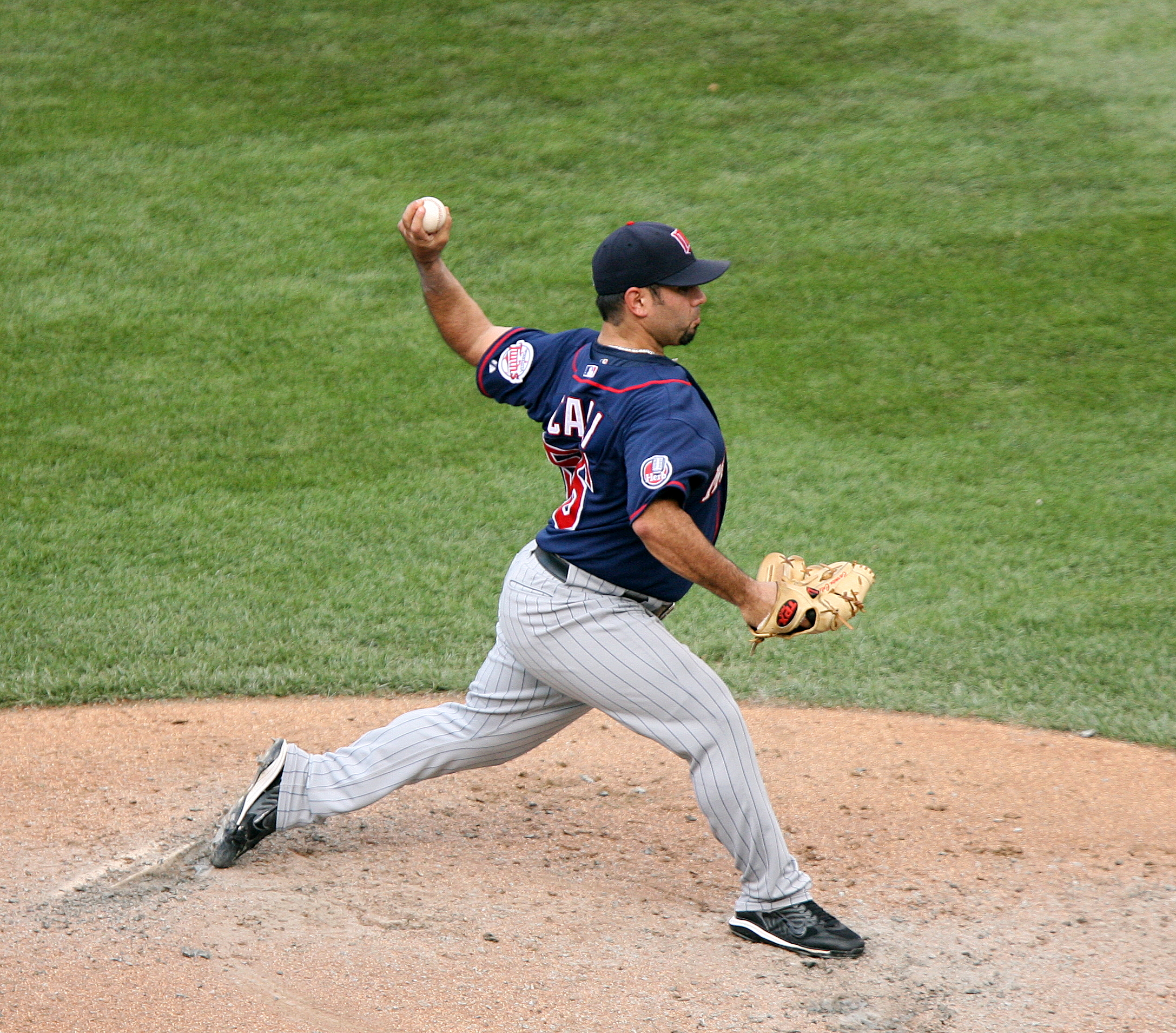 Carmen Cali